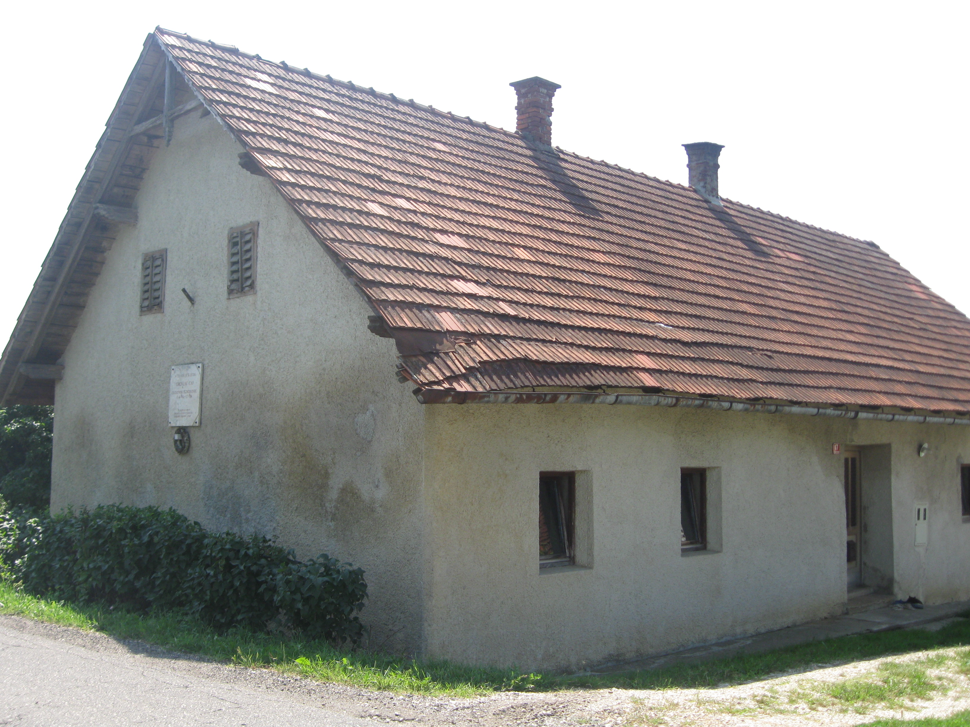 V majhni kmečki hiši se je leta 1814 rodil Oroslav Caf, slovenski jezikoslovec. Na pročelju hiše je spominska plošča.